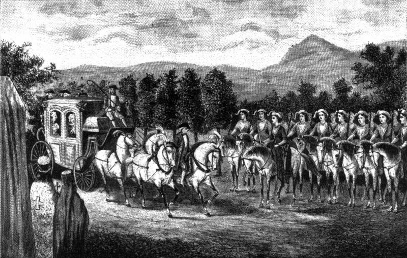 Встреча Екатерины II «Амазонской ротой» вблизи Балаклавы в 1787 году. Впереди строя - ротный капитан Елена Ивановна Сарандова. Данное изображение было использовано в статье «Амазонская рота» опубликованной во втором томе «Военной энциклопедии», который был издан книгоиздательским товариществом Ивана Дмитриевича Сытина в 1911 году в столице Российской империи городе Санкт-Петербурге.